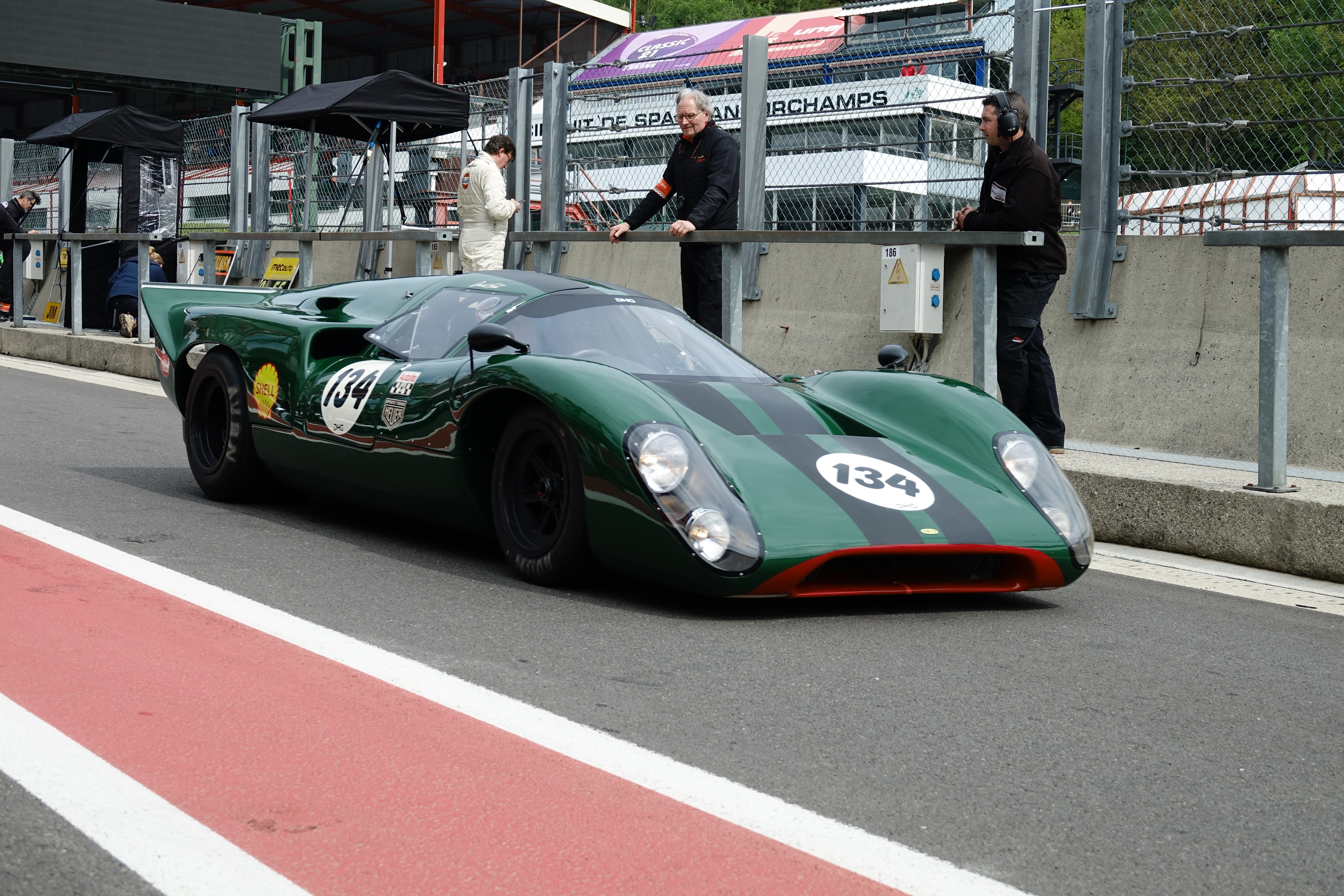 Lola T70 MkIII B au Spa Classic 2019